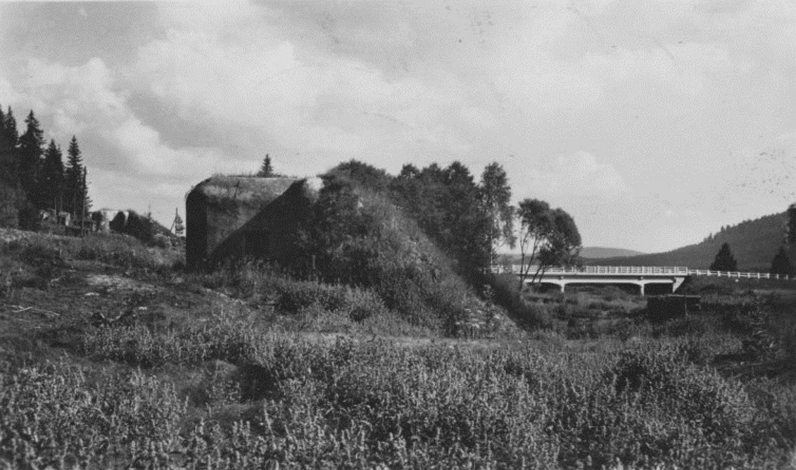 Pohled na Soumarský most v roce 1938 (v popředí pevnůstka lehkého opevnění vzor 37). Most byl zbudován v roce 1937 a zničen německou armádou v květnu 1945.